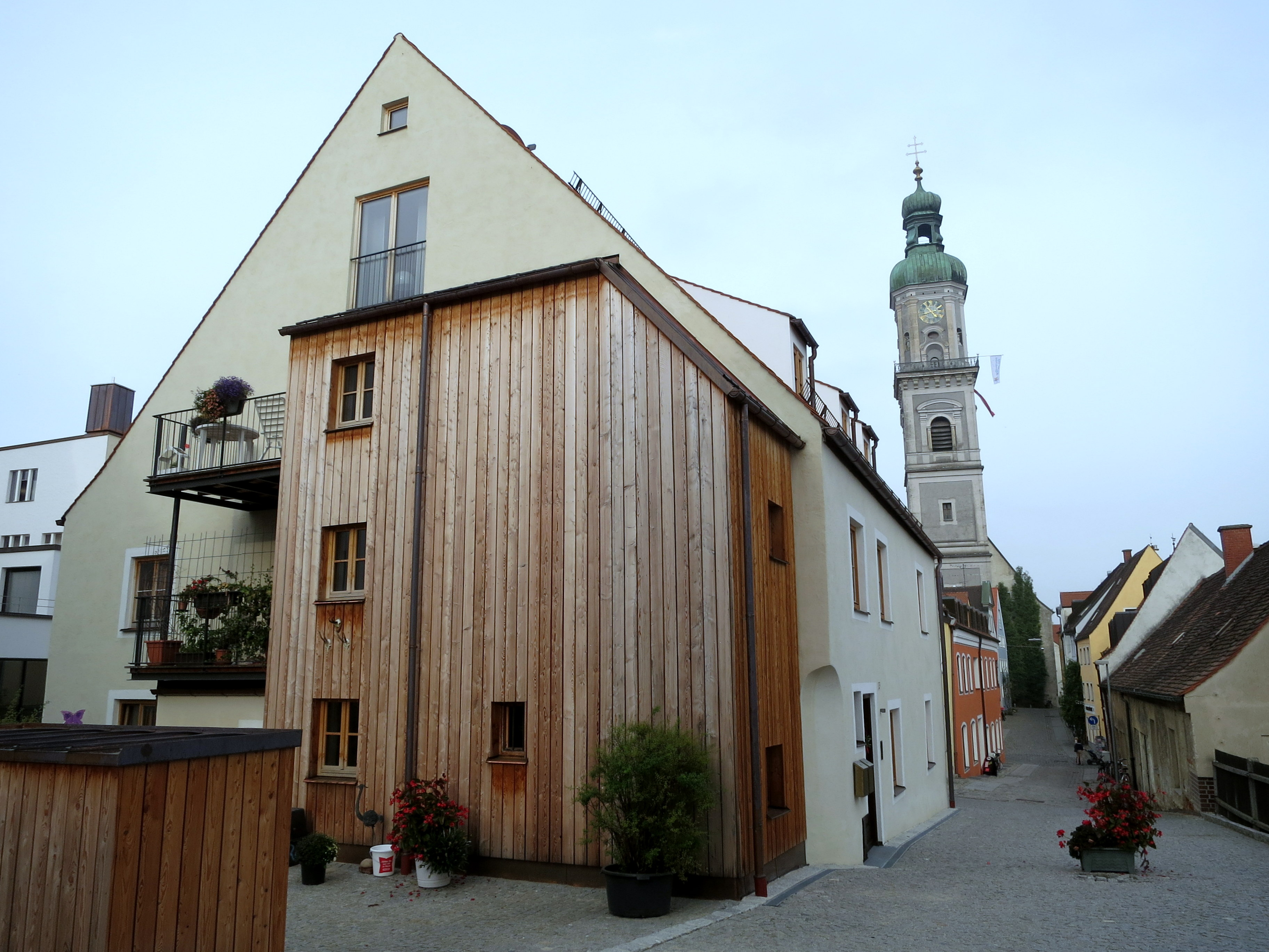 Preisgekröntes Baudenkmal